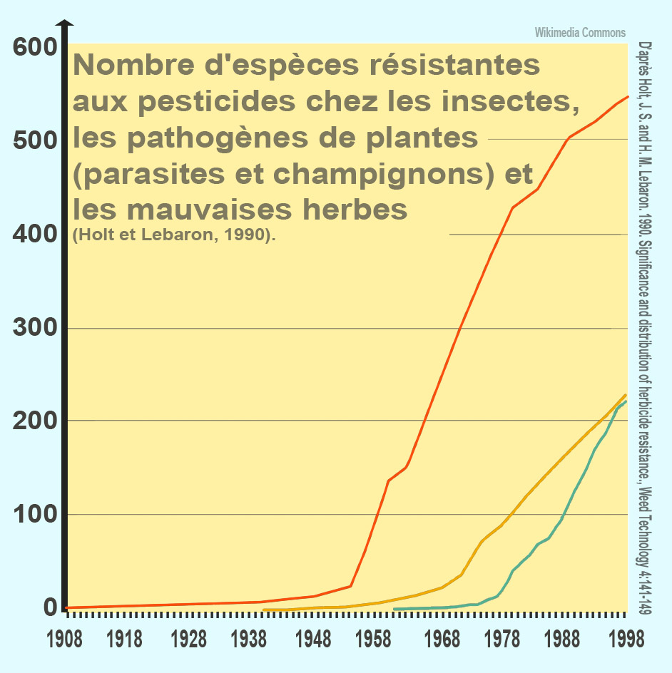 Graphique présentant le nombre croissant d'adaptation à des pesticides chez les insectes, les pathogènes de plantes (parasites et champignons) et mauvaises herbes (Holt et Lebaron 1990).d'après données collectées par Holt, J. S. and H. M. Lebaron. 1990. in "Significance and distribution of herbicide resistance". Weed Technology 4:141-149. Des graphes d'aspect assez similaires existent pour les adaptations aux désherbants. orange=arhtropods yellow=plant pathogens blue=weeds